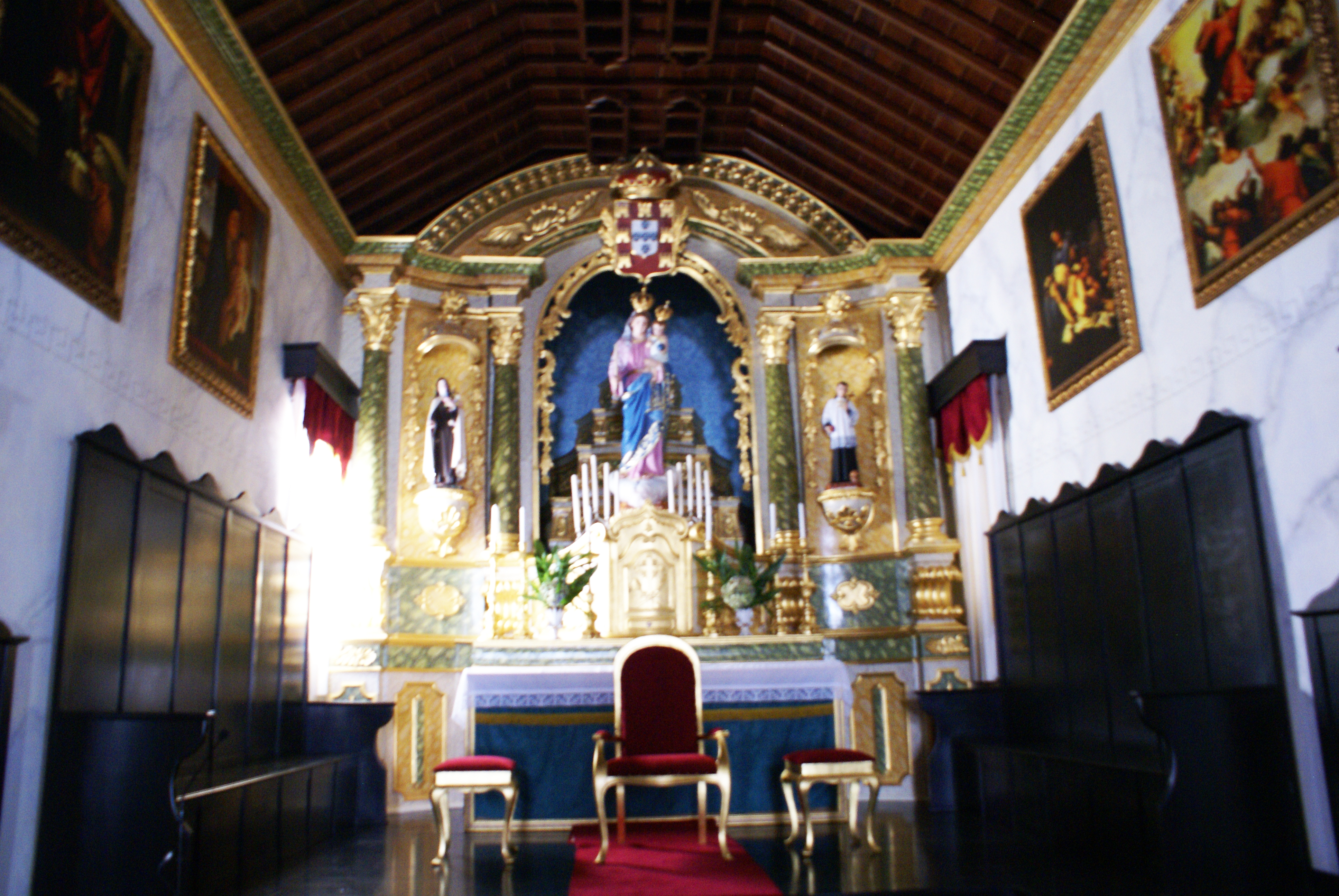 Igreja de Nossa Senhora da Luz, altar mor, Santa Cruz da Graciosa, ilha Graciosa, Açores, Portugal